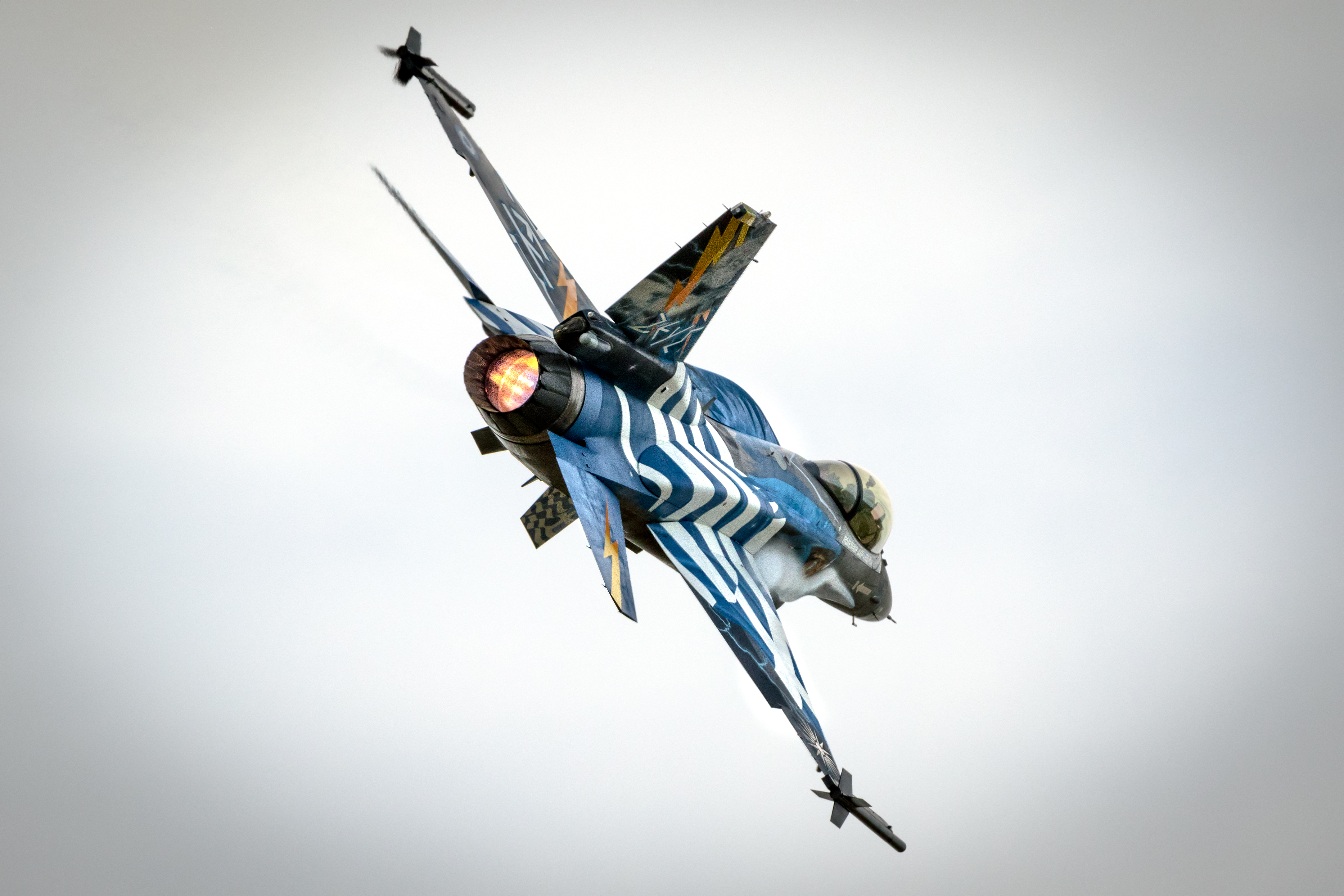 F-16-Demo-Team-Zeus-0001